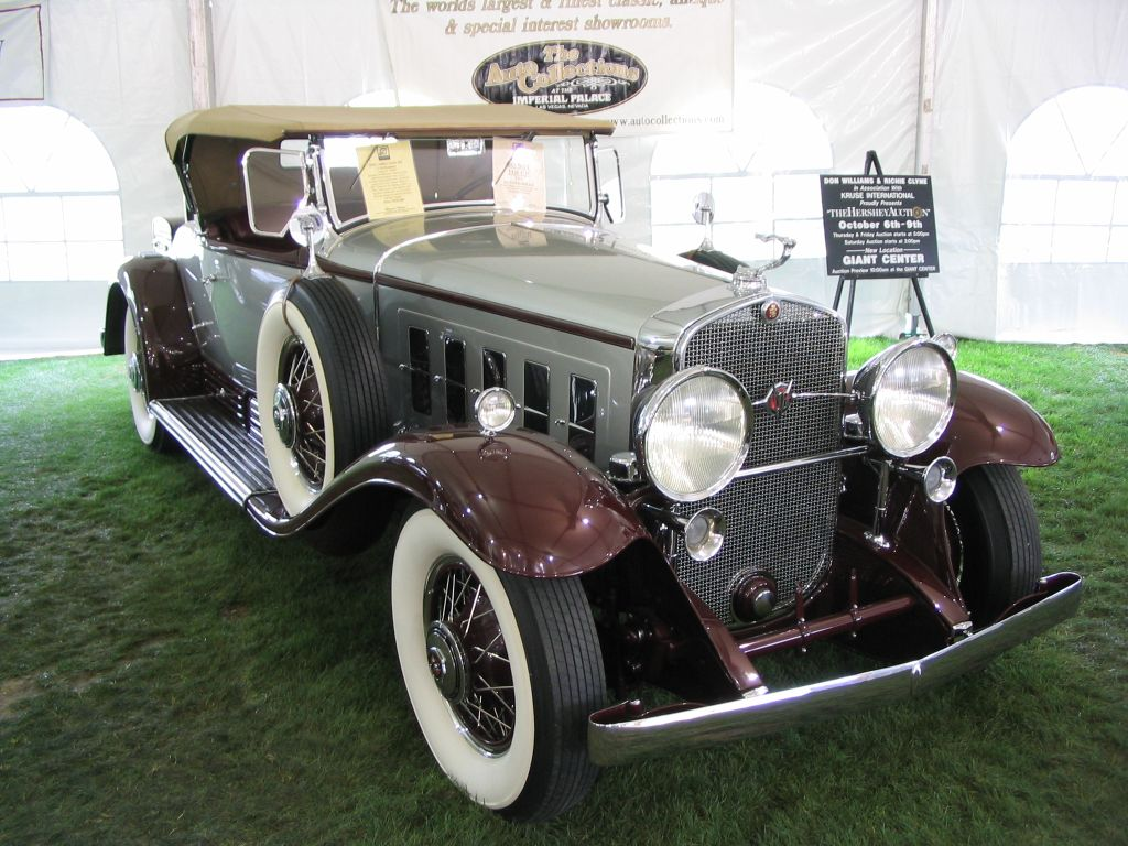 Cadillac V-16 Roadster Baujahr 1930, fotografiert von Ramgeis in Pebble Beach, Kalifornien im August 2004, GNU-FDL first upload in de wikipedia on 05:09, 17. Okt 2004 by Ramgeis